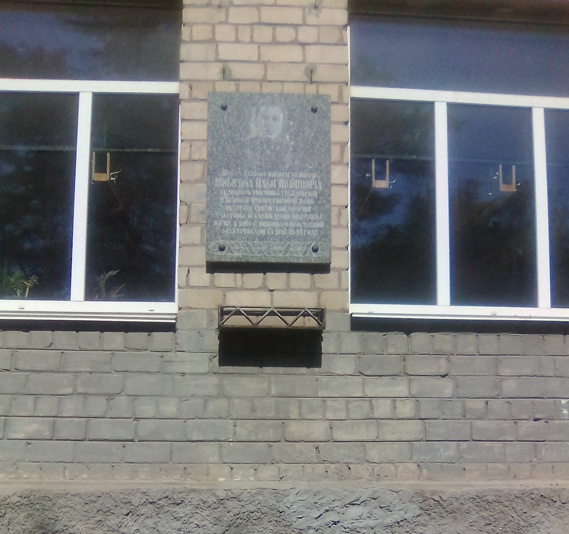 Мемориальная доска генерал-майору Швыгину Илье Ивановичу, установленная на здании общеобразовательной школы № 35 в г. Николаеве (Украина)